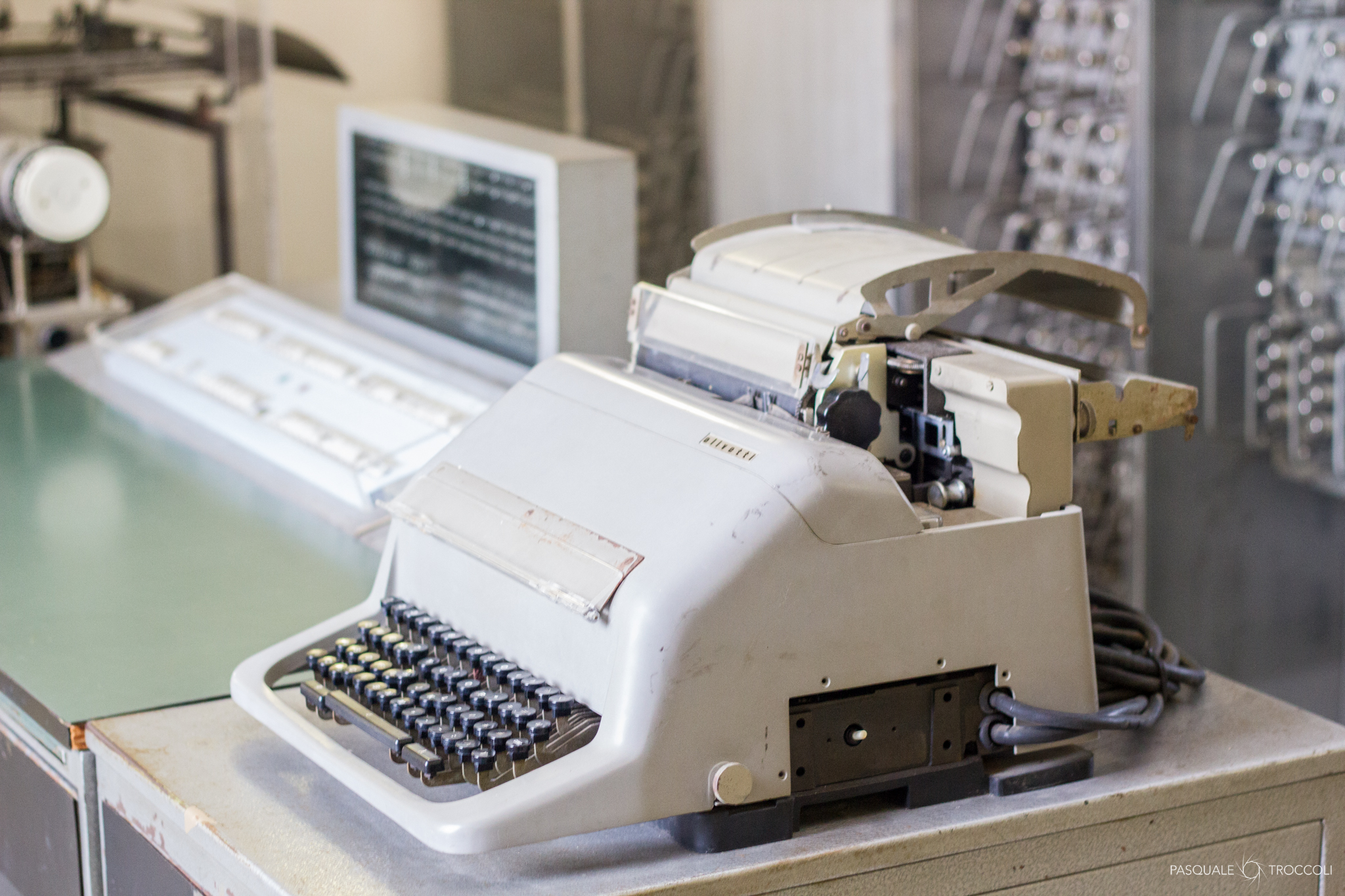 Telescrivente Olivetti modello T2 della CEP - Calcolatrice Elettronica Pisana